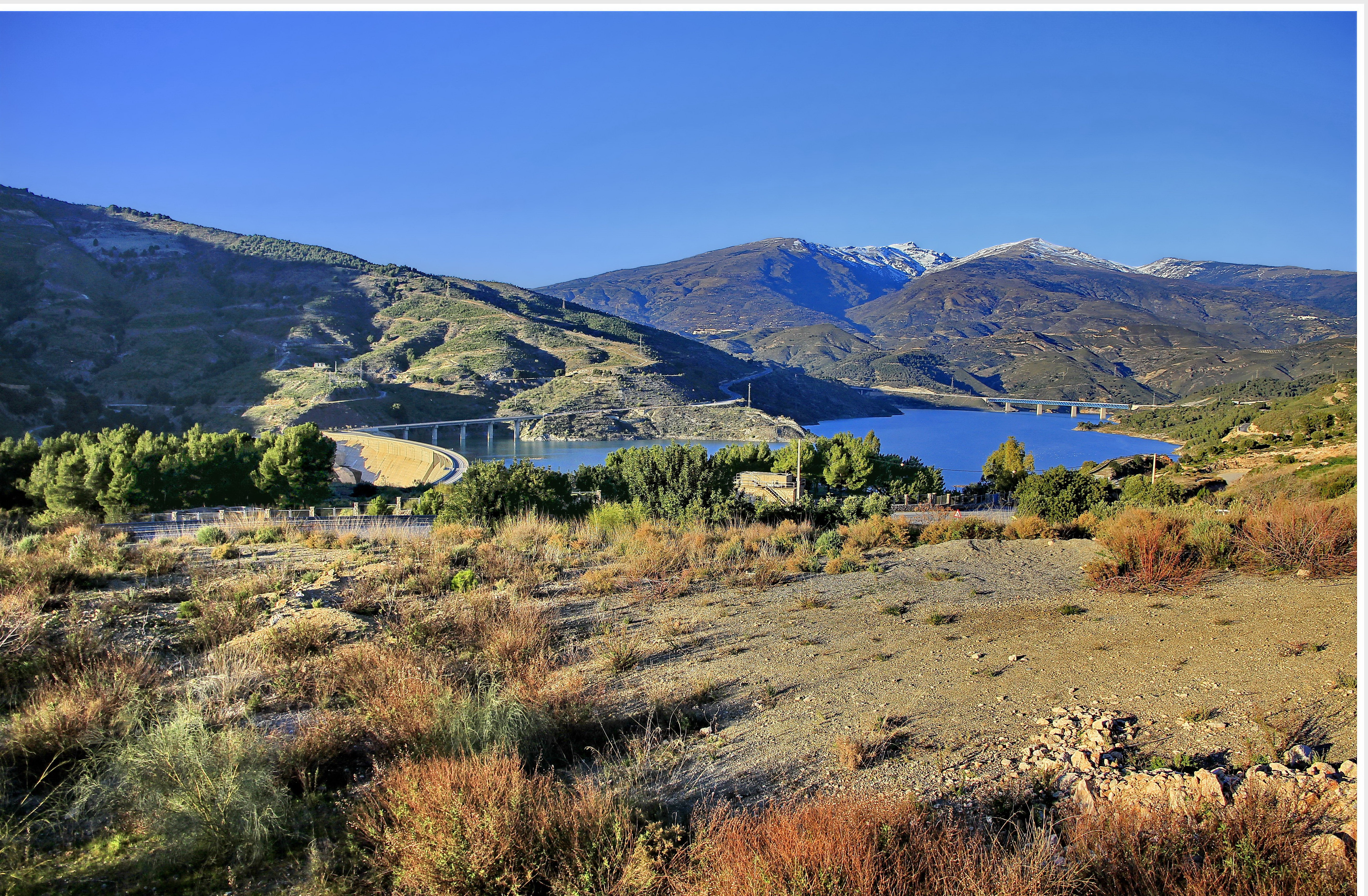 Rio Guadalfeo à proximité de Vélez de Benaudalla